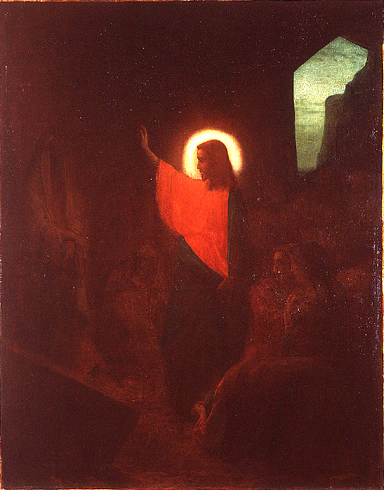 Charles Sellier, La résurrection de Lazare, Prix de Rome 1857, Paris, Ecole Nationale Supérieure des Beaux-Arts, inventaire PRP 106.